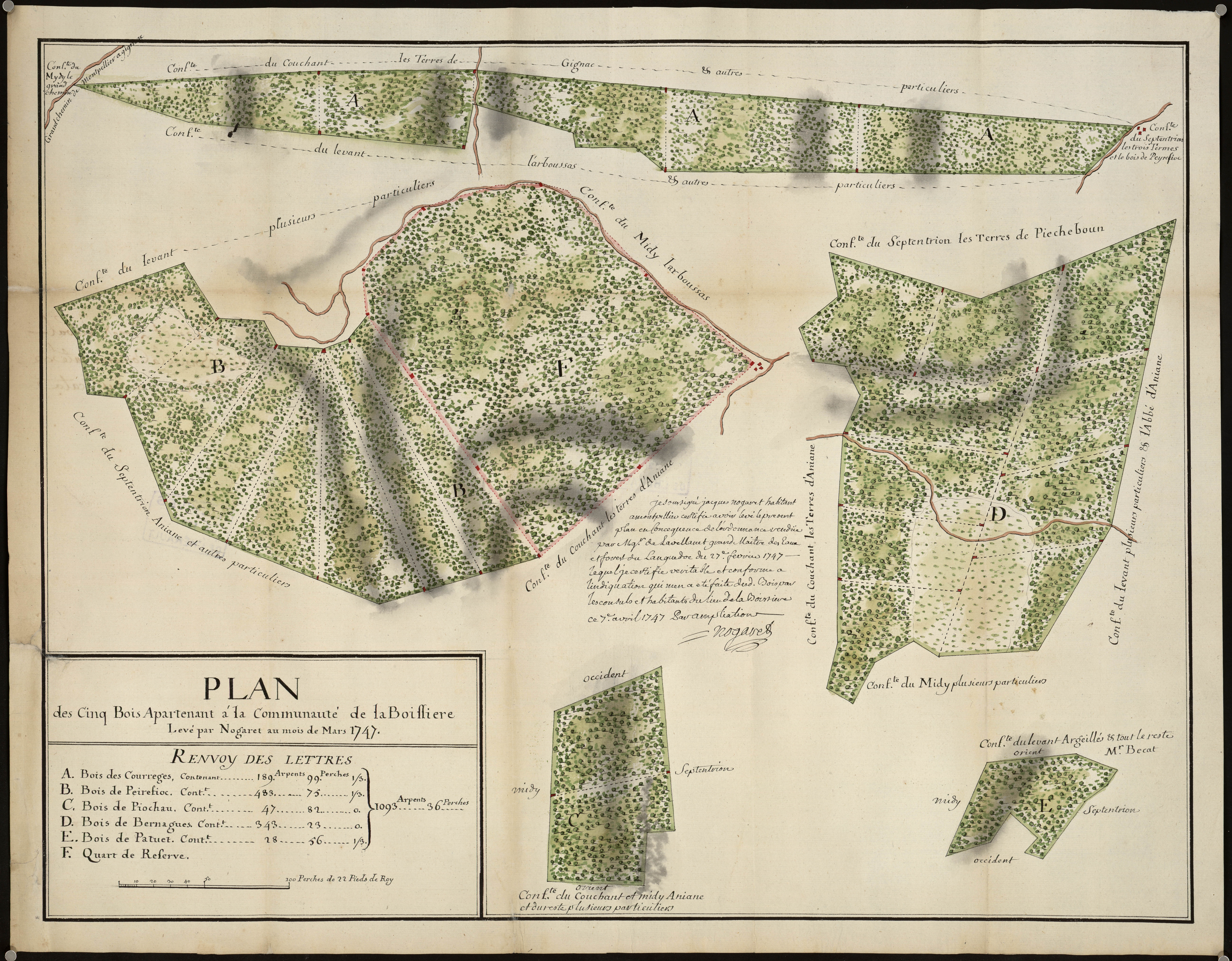 La Boissière. - Plan des cinq bois appartenant à la communauté : bois des Courreges, de Peirefioc, Piochau, Bernagues et Patuel.